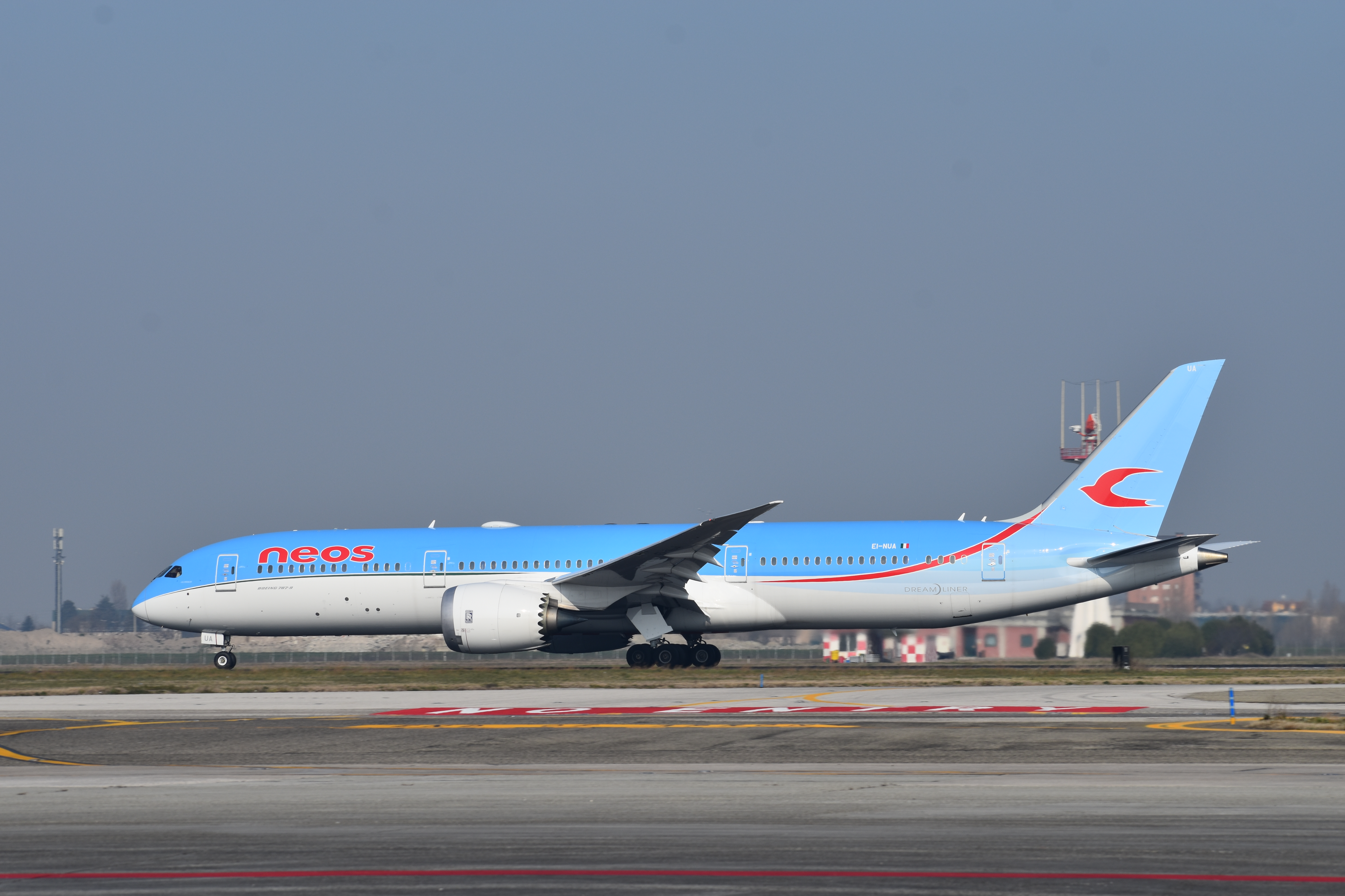 Un Boeing 787-900 Dreamliner Neos Air in partenza per Pointe-à-Pitre